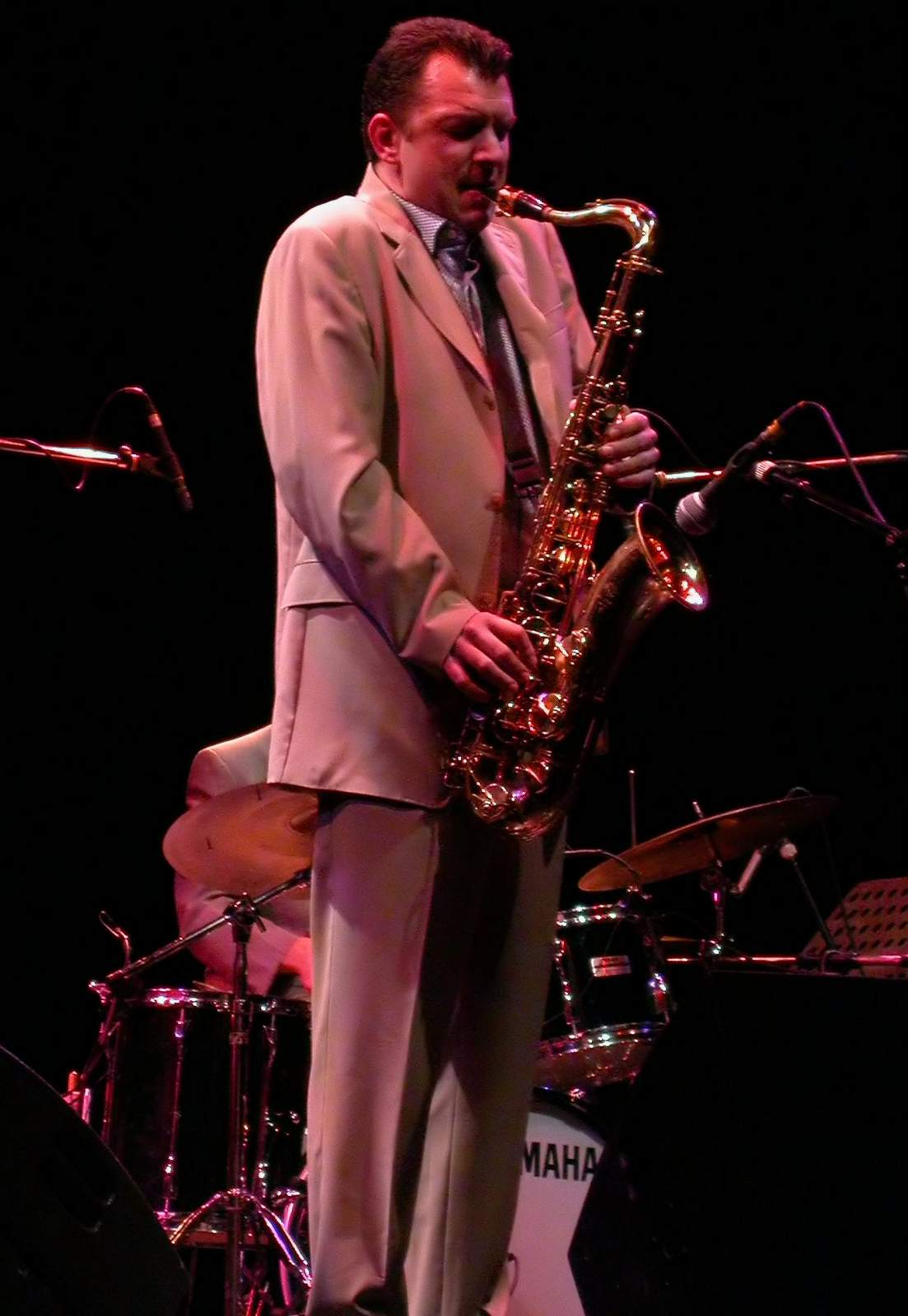 Michel Pastre, Jazz à Juan Révélations 2005